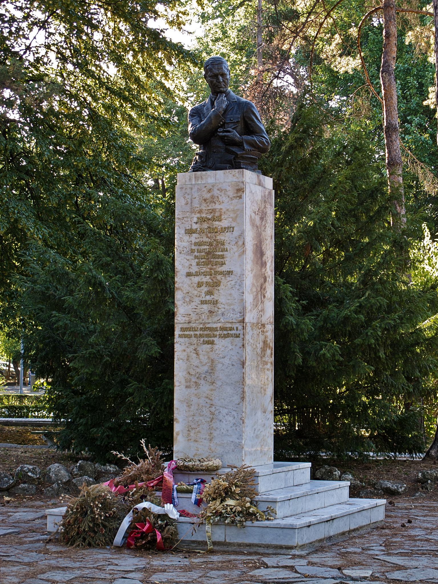 Споменик Арчибалду Рајсу, Топчидерски парк, Београд, Србија